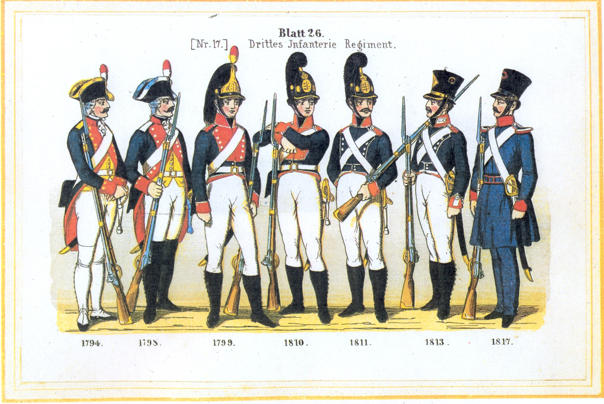 Blatt 26: 3. Infanterie-Regiment